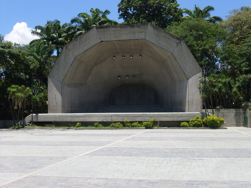 Parque Generalisimo Francisco de Miranda (Parque del Este), en Caracas - Venezuela (2012)